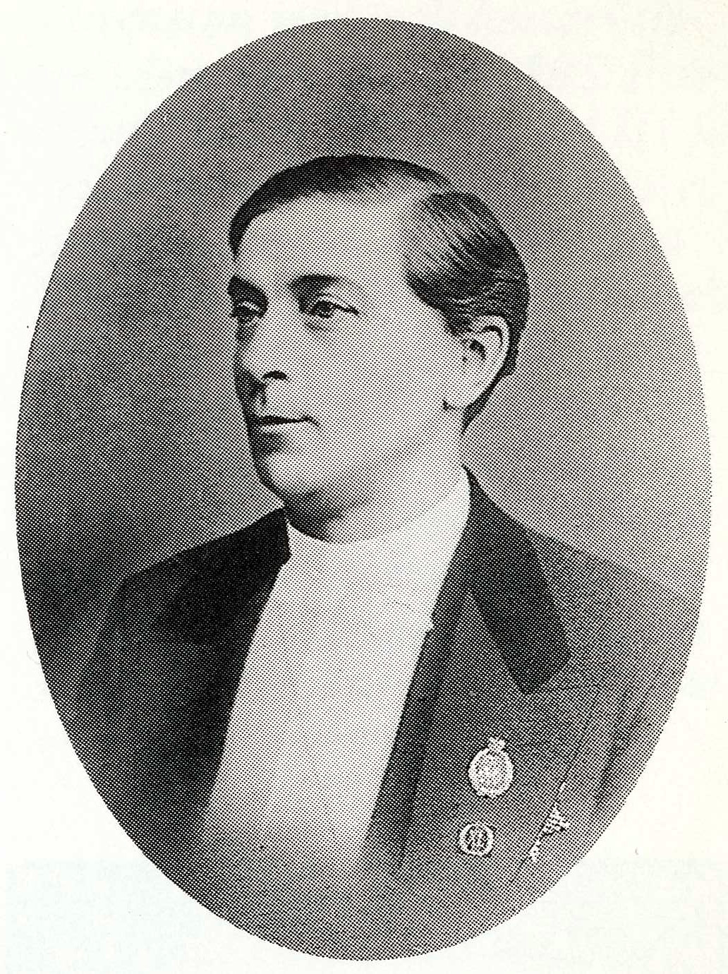 Ministerivaltiosihteeri Theodor Bruun (1821–1888). Kuva otettu Pietarissa 1880-luvun puolivälissä.